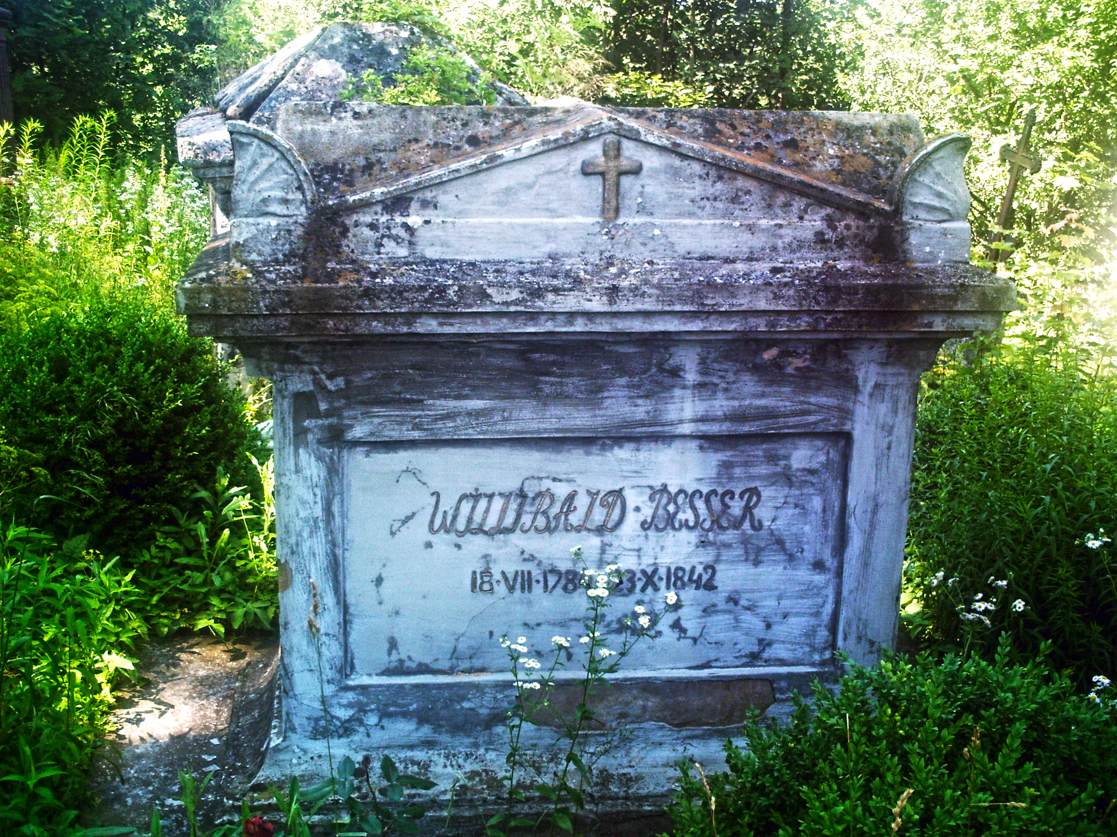 Місце поховання Вілібальда Бессера в м.Кременець